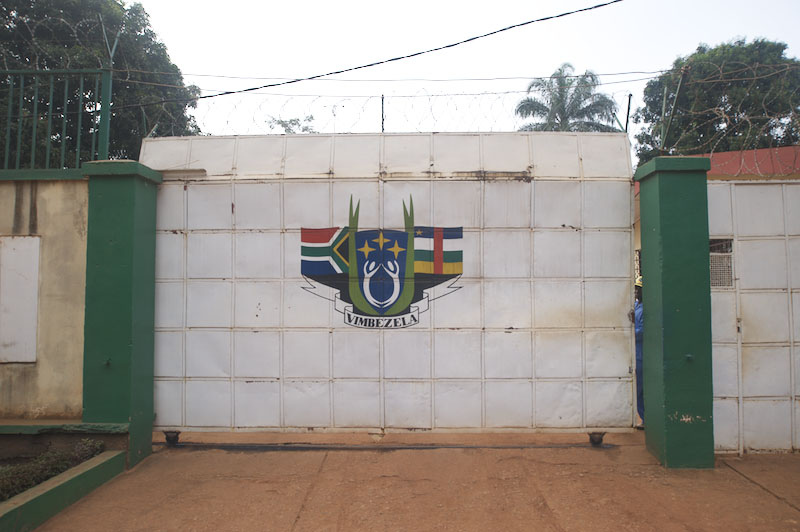 CAR Army Base "Vimbezela" in Bangui